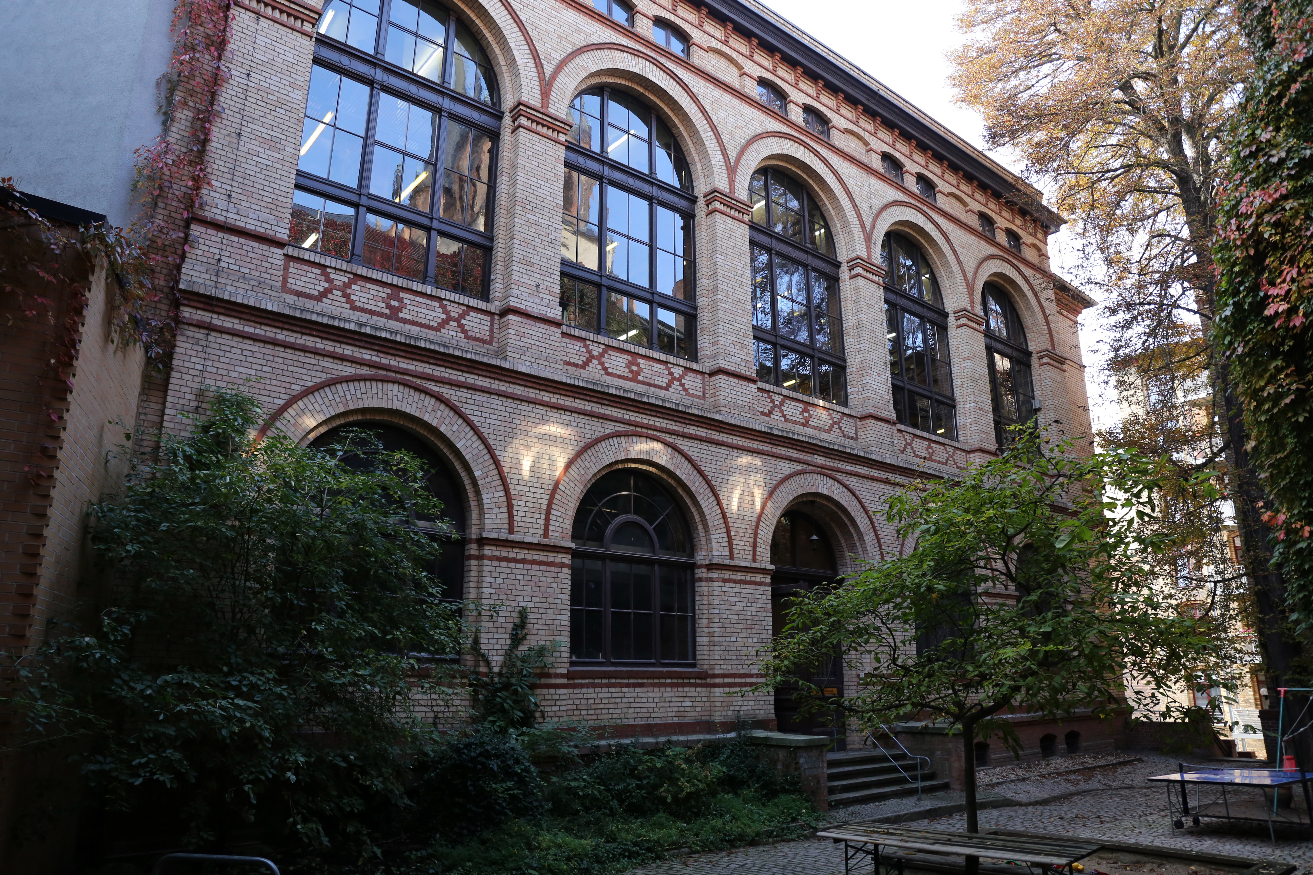 Außenansicht der Marienbibliothek in Halle (Saale)